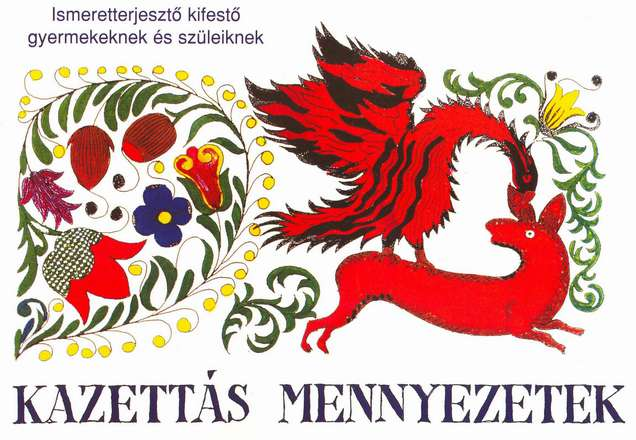 Mennyezetkazetta Noszvajról (Heves megye)